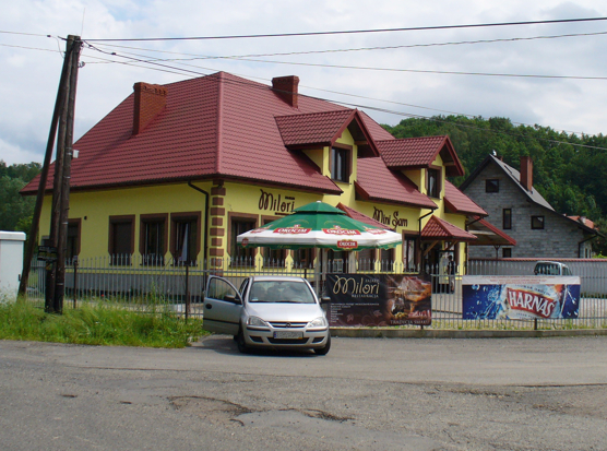 Zajazd i sklep spożywczy w Wiatowicach